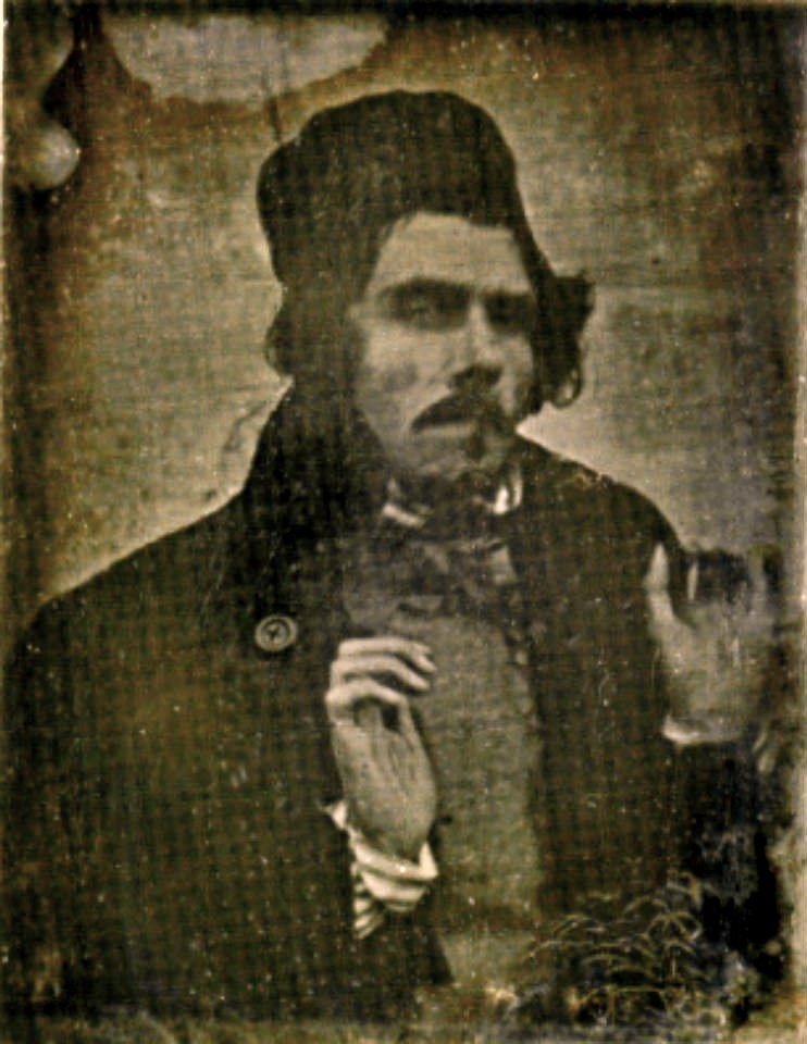 Portrait of Eugène Delacroix(1798-1863)